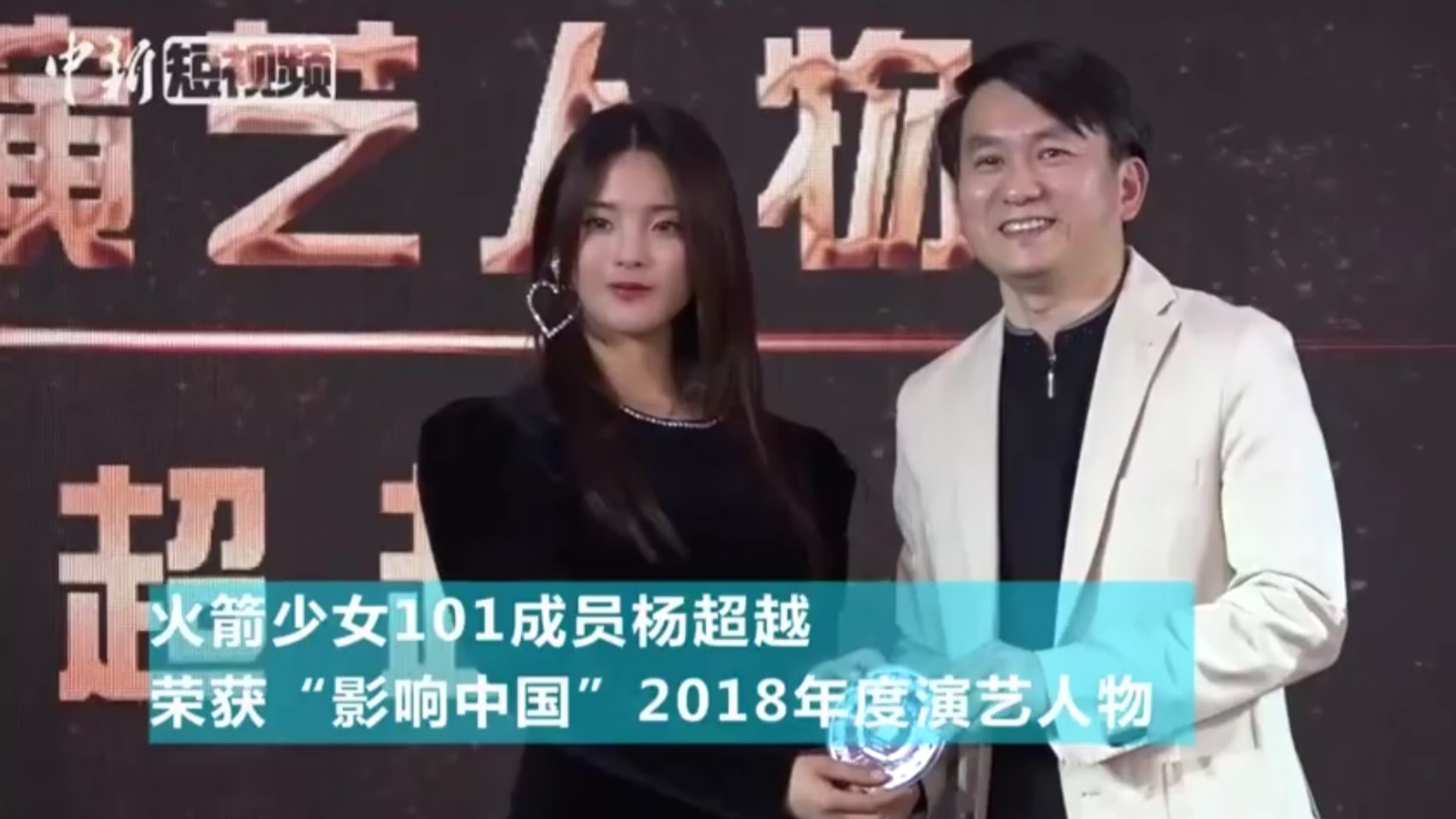 中文（中国大陆）: 杨超越获颁“影响中国”2018年度演艺人物